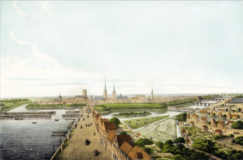 Hamburg,1587, vom Turm des äusseren Dammtor über den Jungfernstieg gesehen.